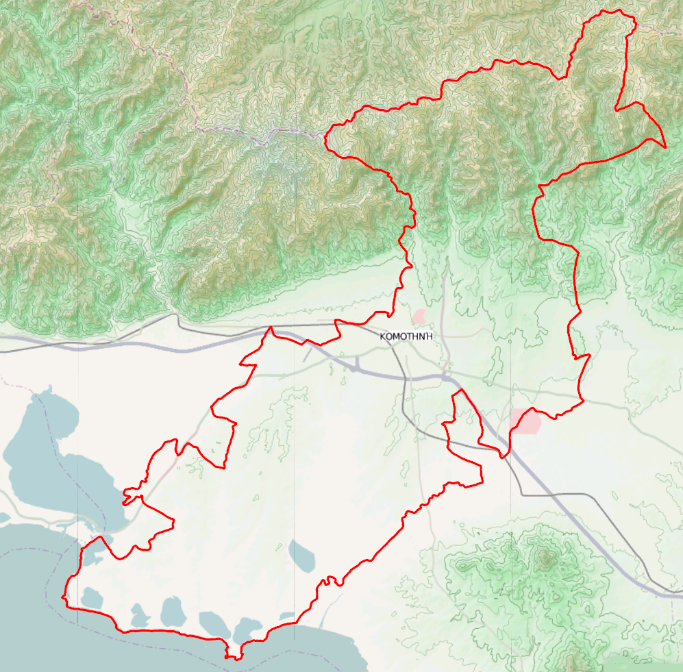 Τοπογραφικός χάρτης του Δήμου Κομοτηνής.